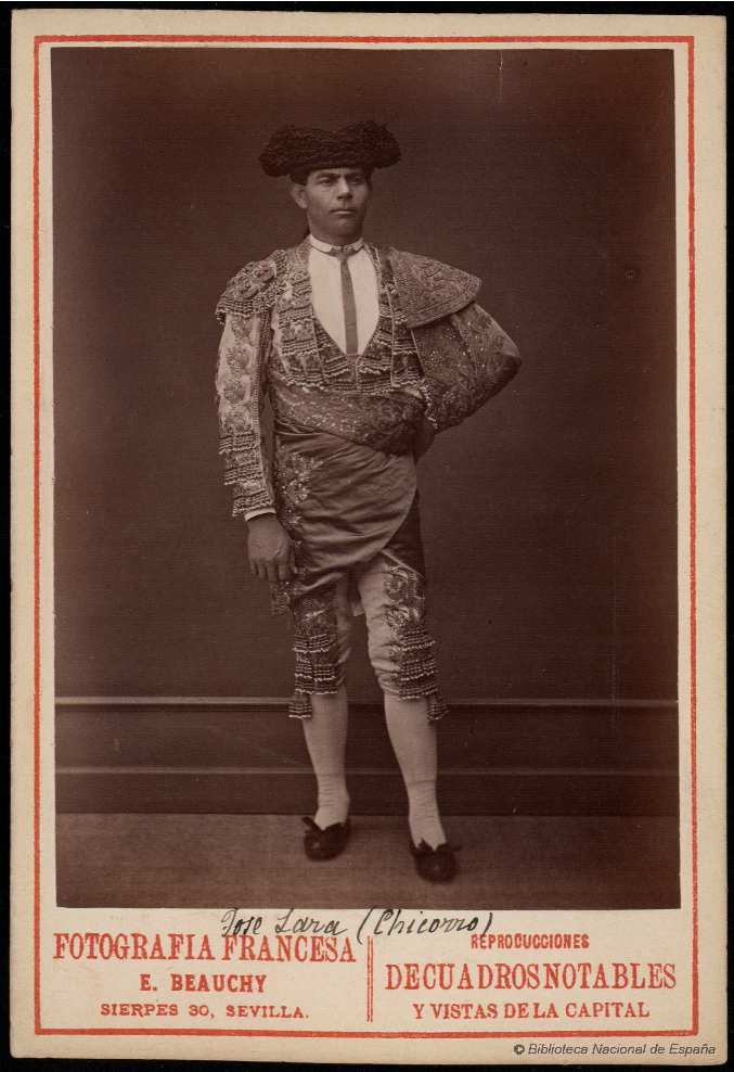 José Lara, Chicorro, fotografía de Emilio Beauchy, Sevilla, 1889. Papel albúmina. Biblioteca Nacional de España